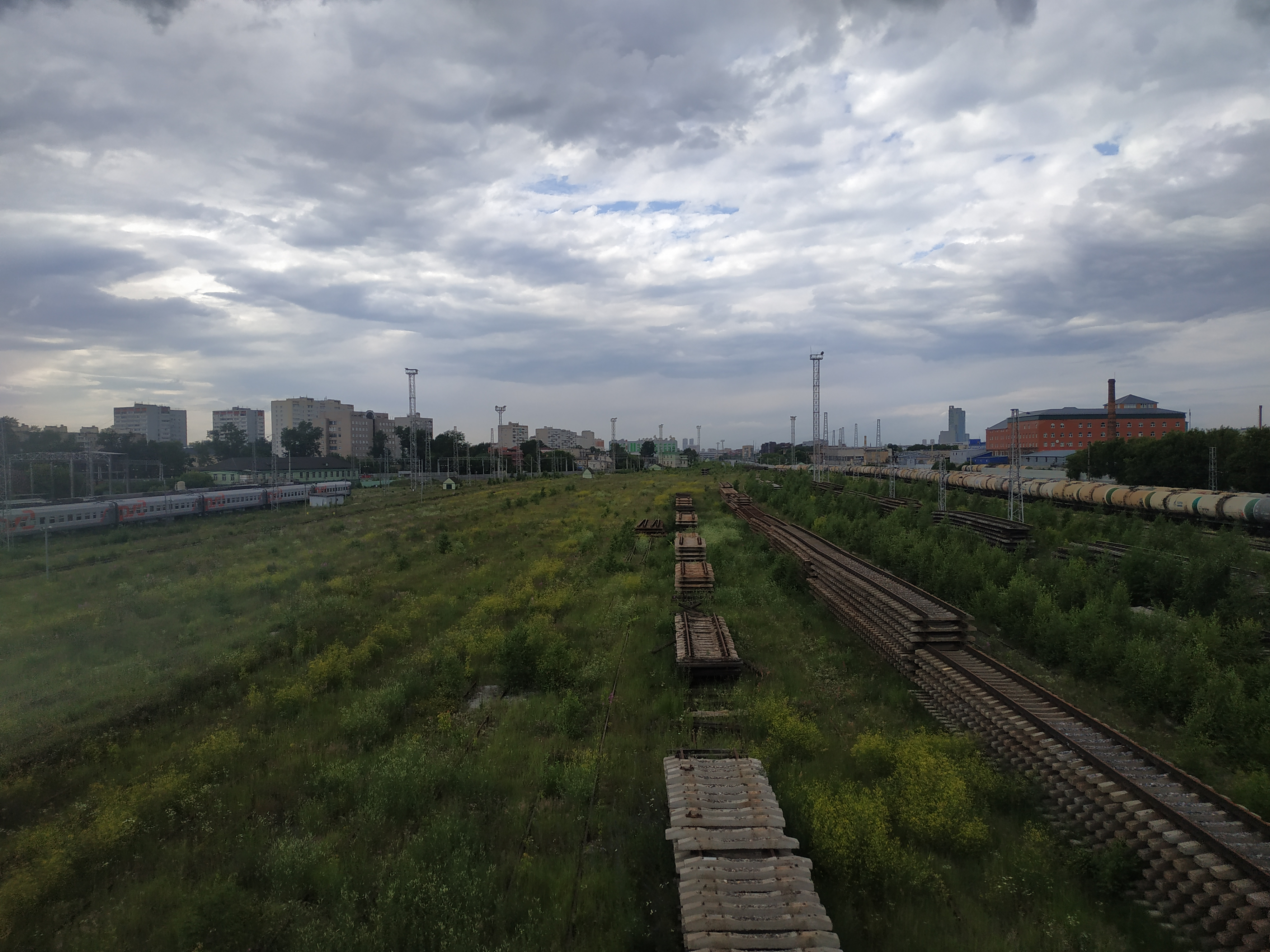 перово-4